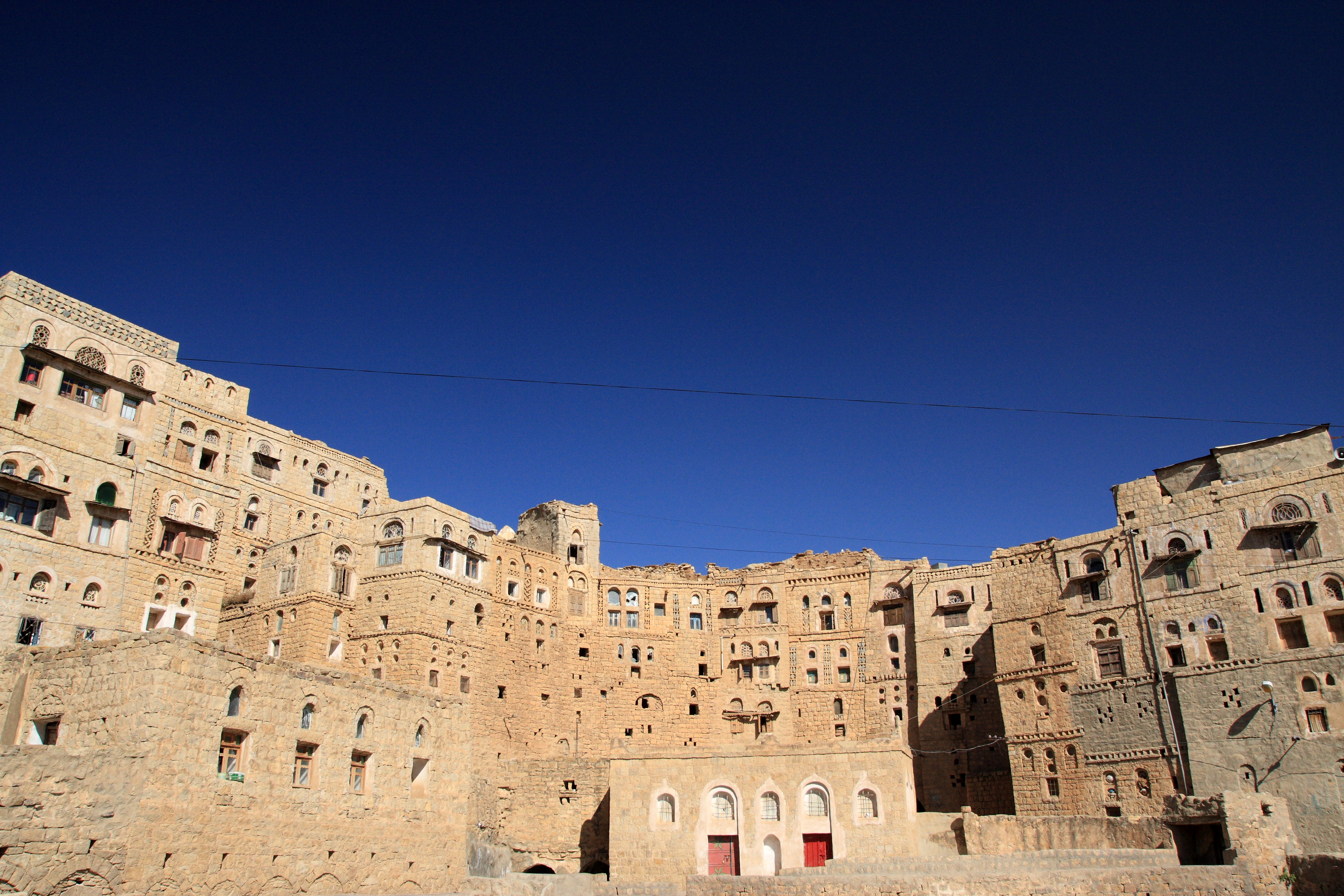 Hababa, Haraz Mountains, Yemen